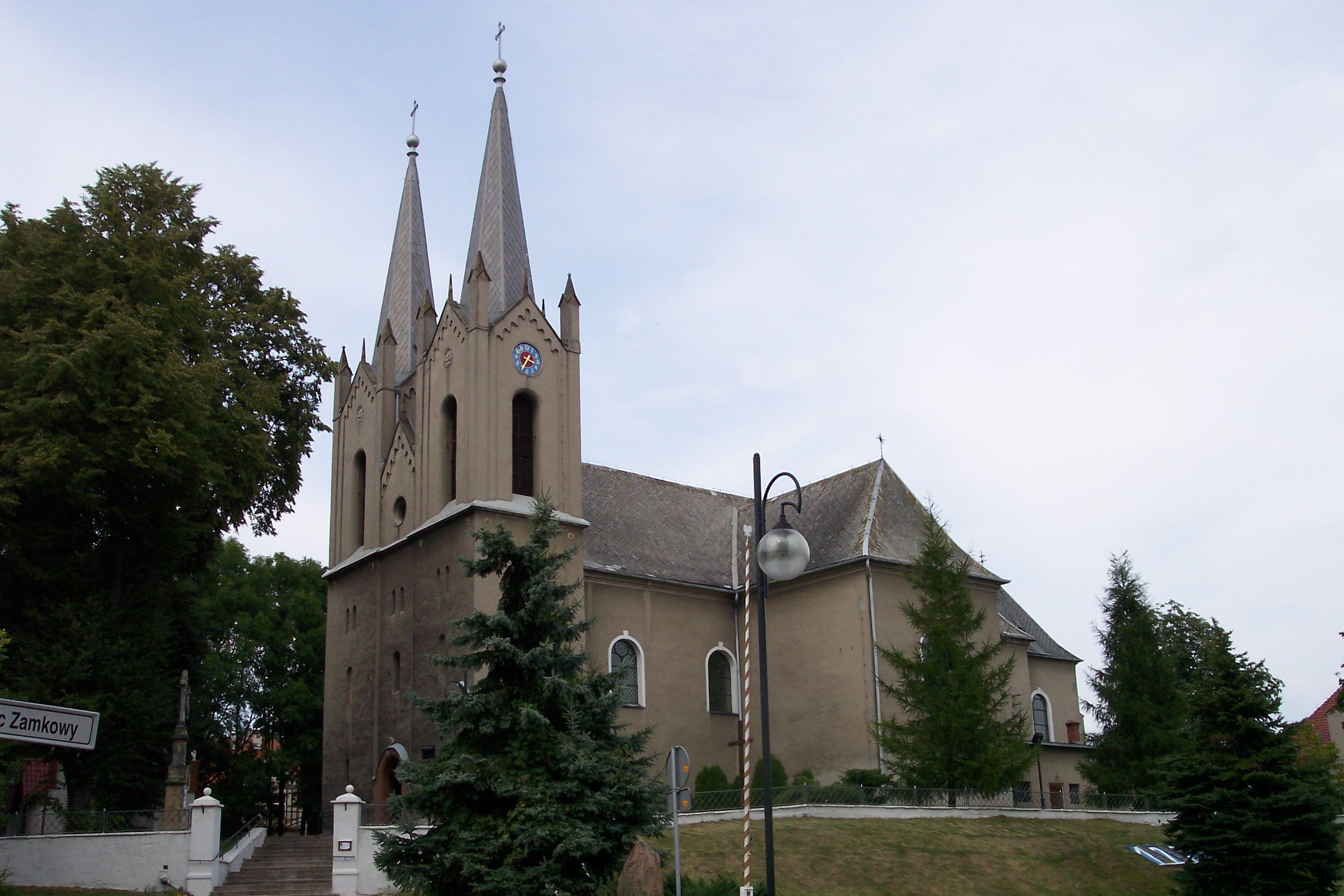 Kościół p.w. św. Andrzeja Apostoła w Ujeździe